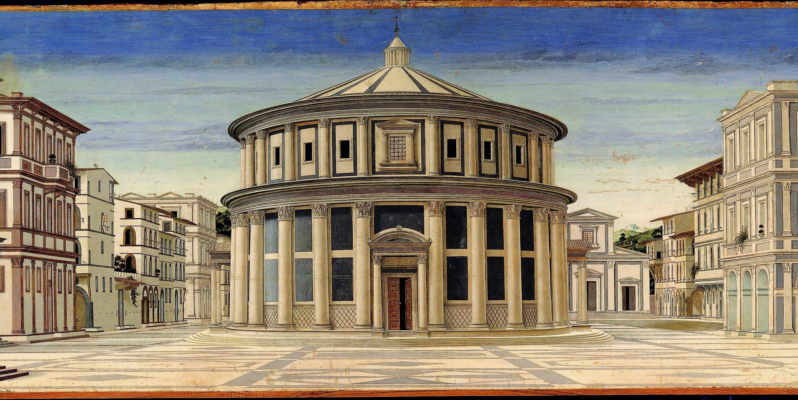 Dettaglio dal dipinto La Città Ideale